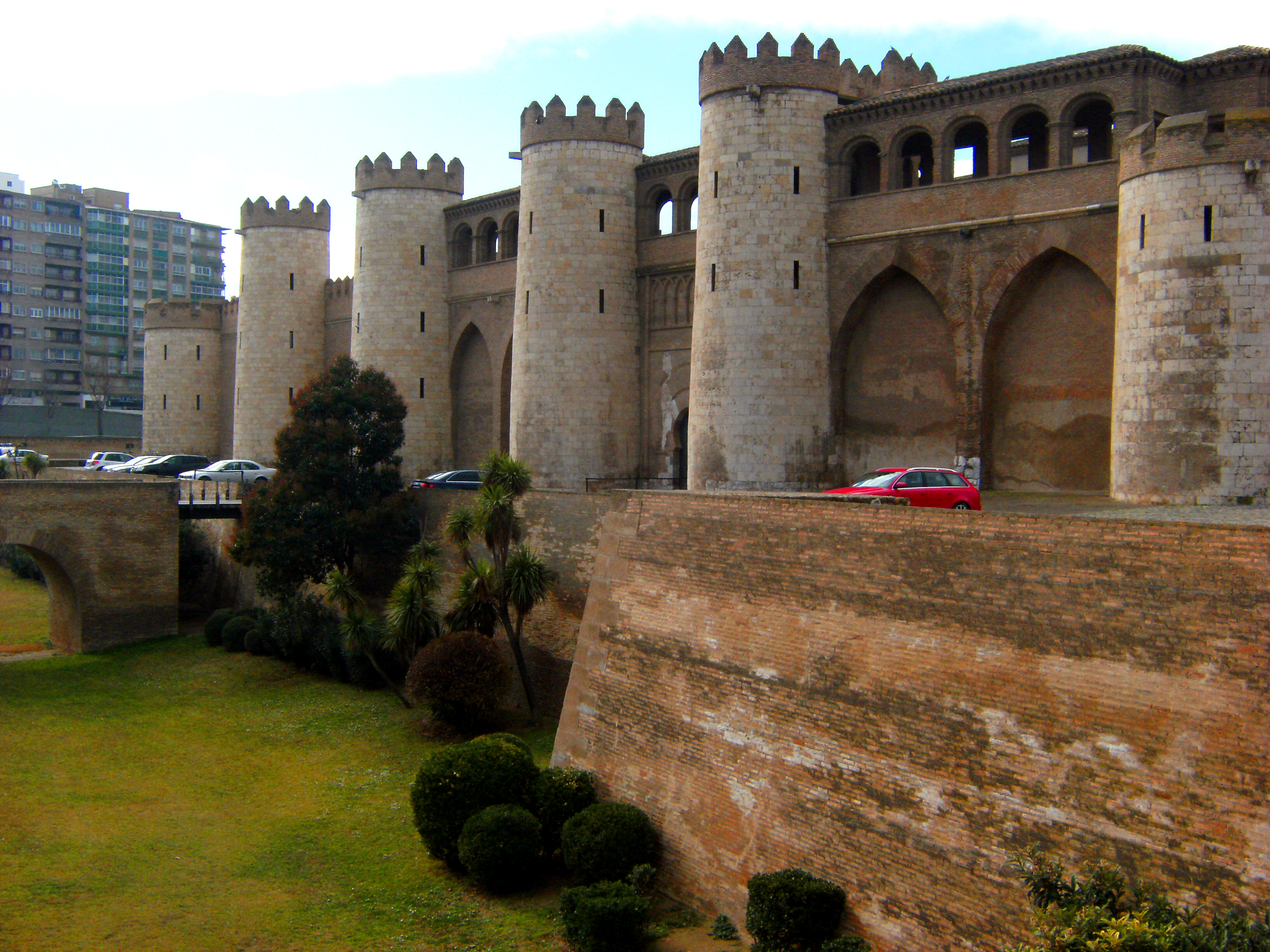 Дворецът Алхаферия отвън